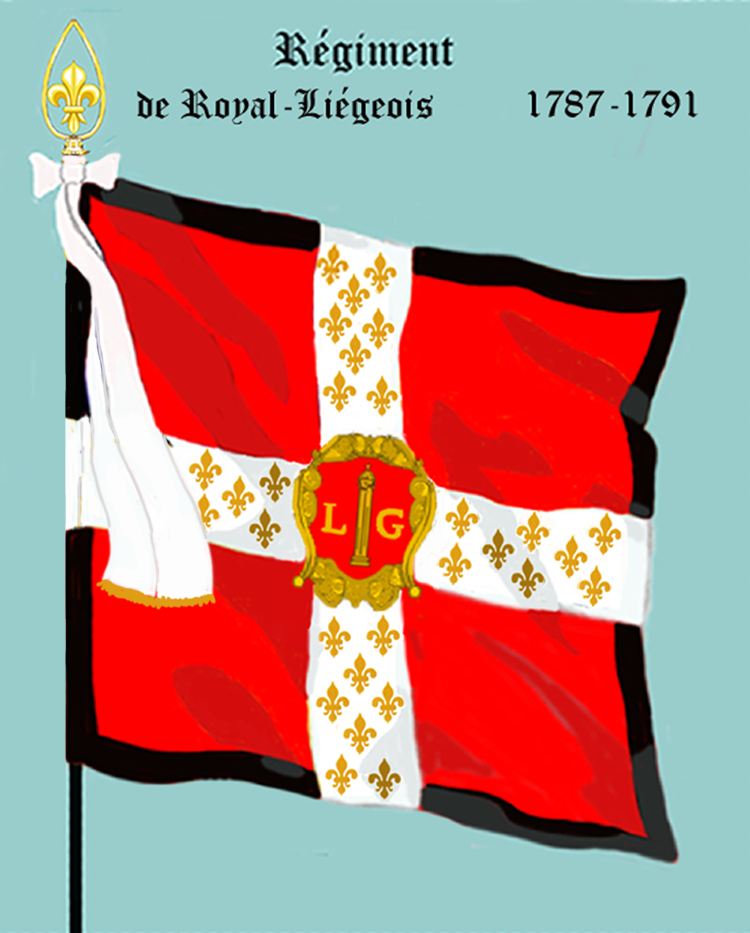 Ordonnanzfahne eines königlich französischen Infanterie-Regiments. (Fremdenregiment aus Wallonien)- Entnommen und überarbeitet aus: „LES UNIFORMES ET LES DRAPEAUX DE L'ARMÉE DU ROI“ Marseille 1899. (Drapeau d'Ordonnance d'un régiment française d'infanterie royale. (Régiment étrangère wallon.)